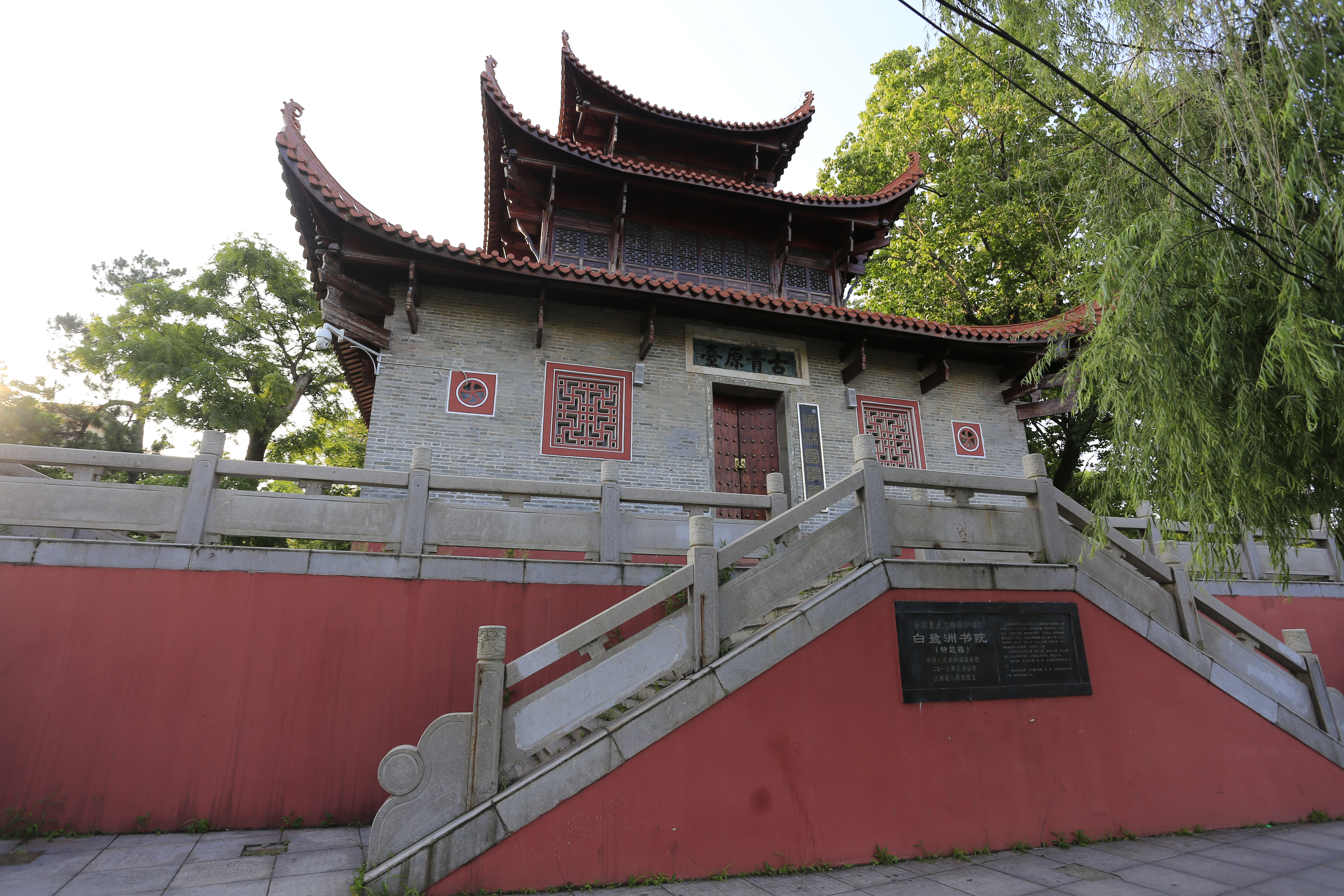 白鹭洲书院 钟鼓楼（古青原台）